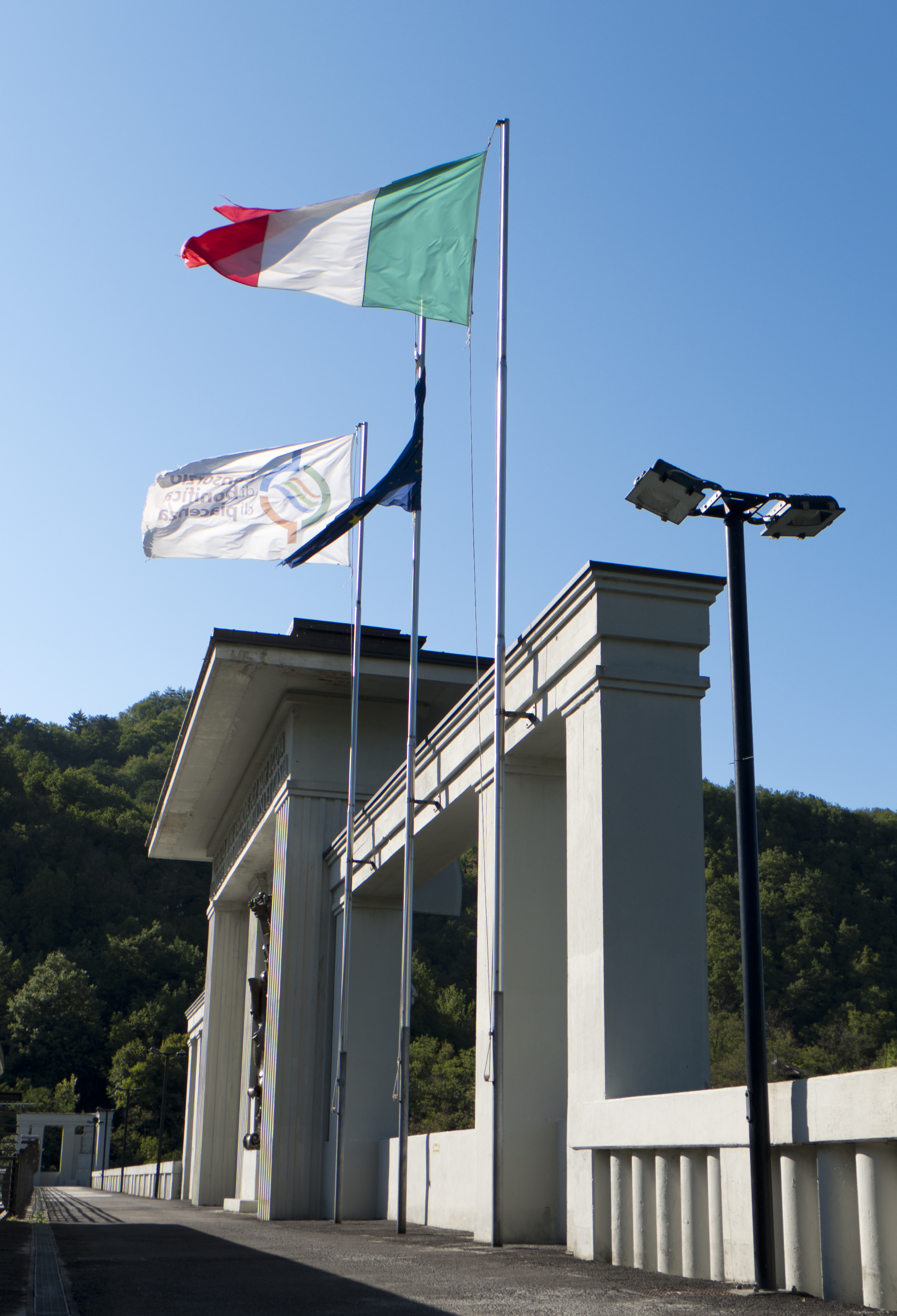 Diga del Molato This is a photo of a monument which is part of cultural heritage of Italy.